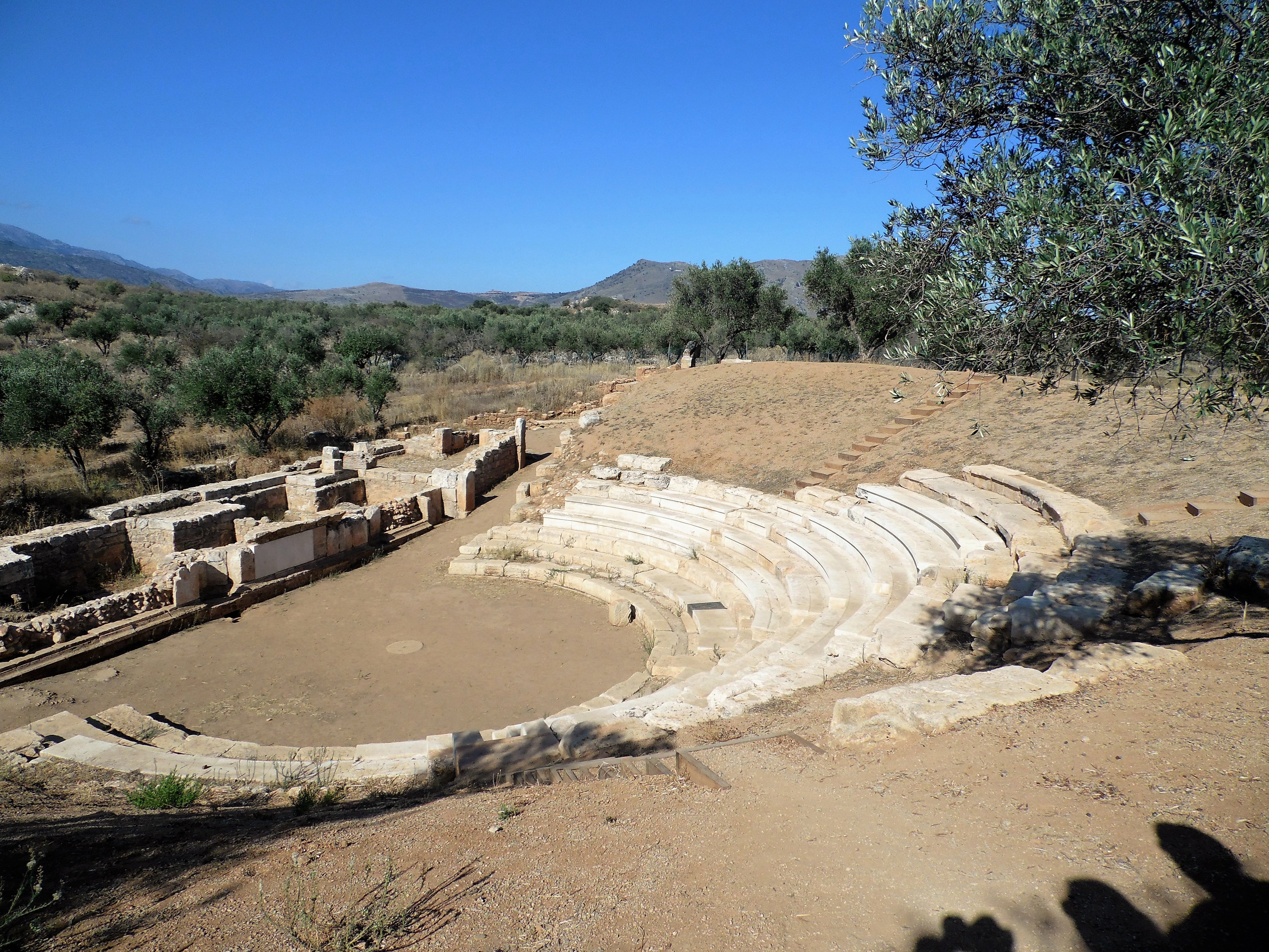 Das antike Theater von Aptera (Ἄπτερα) auf einem etwa 200 m hohen Felsplateau nahe der Souda-Bucht und der Stadt Chania wurde in zwei Phasen aus Quadermauerwerk und vereinzelt nur in Ziegelmauerwerk erbaut. Es stammt höchtswahrscheinlich aus der hellenistischen Zeit und im 1. Jahrhundert nach Christus. Archäologen rekonstruierten viele der ehemaligen Sitzreihen aus dem gleichen Gestein und benutzten dabei Werkzeuge ähnlich denen, die in der Antike zur Verfügung standen. Finanziert wurde die Rekonstruktion mit Unterstützung der Europäischen Union.«Άπτερα»